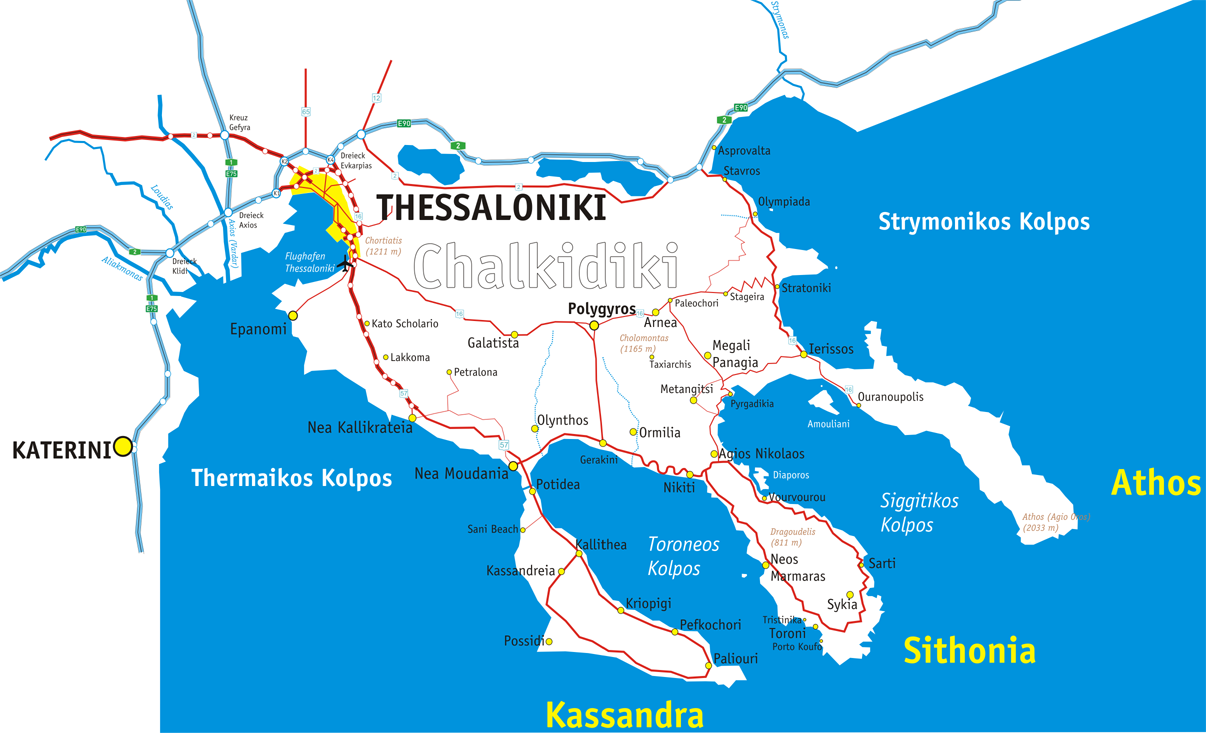 Chalkidiki Halbinsel